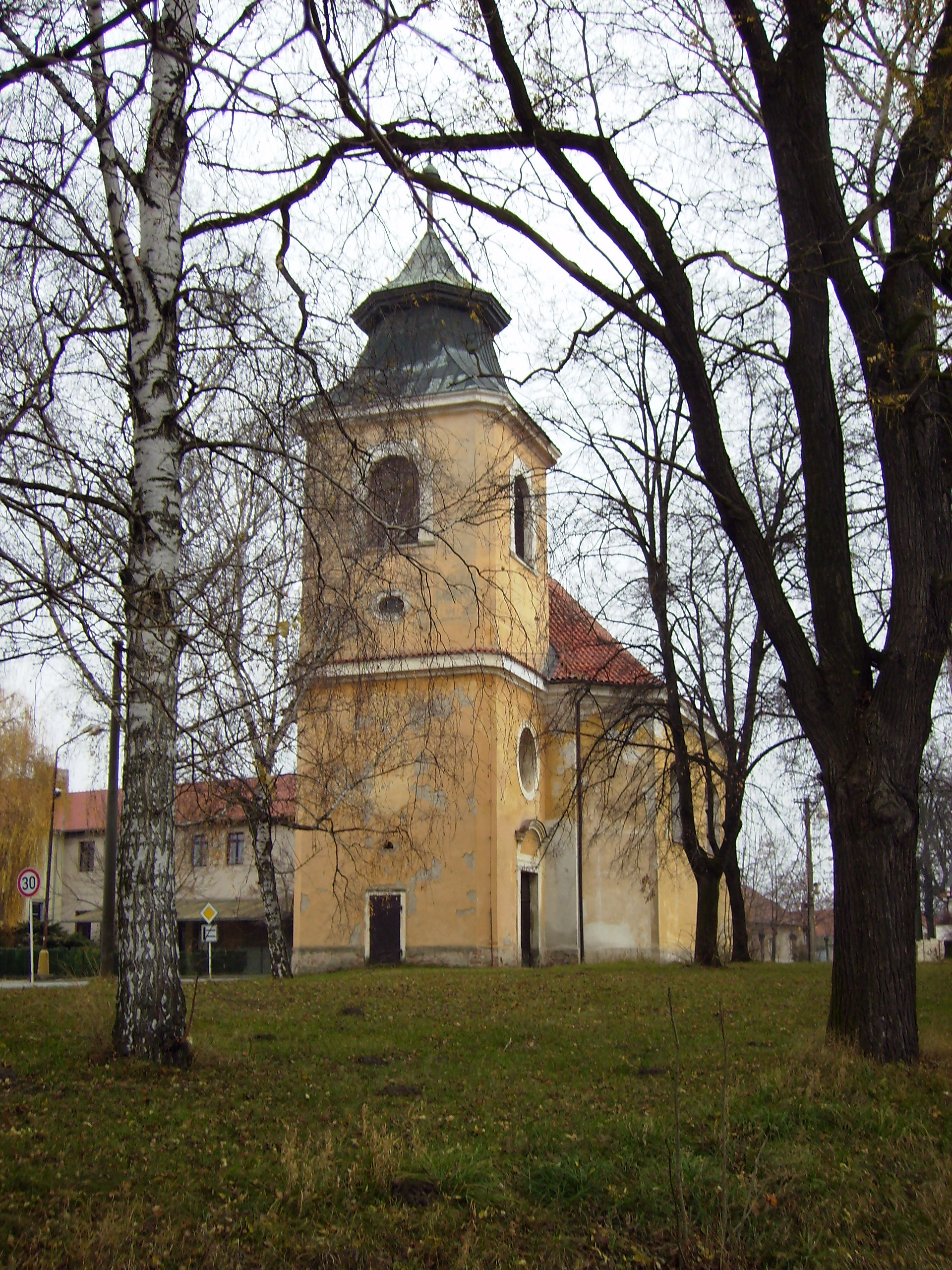 Semice - kostel sv. Maří Magdaleny. Autor: Petr Vilgus